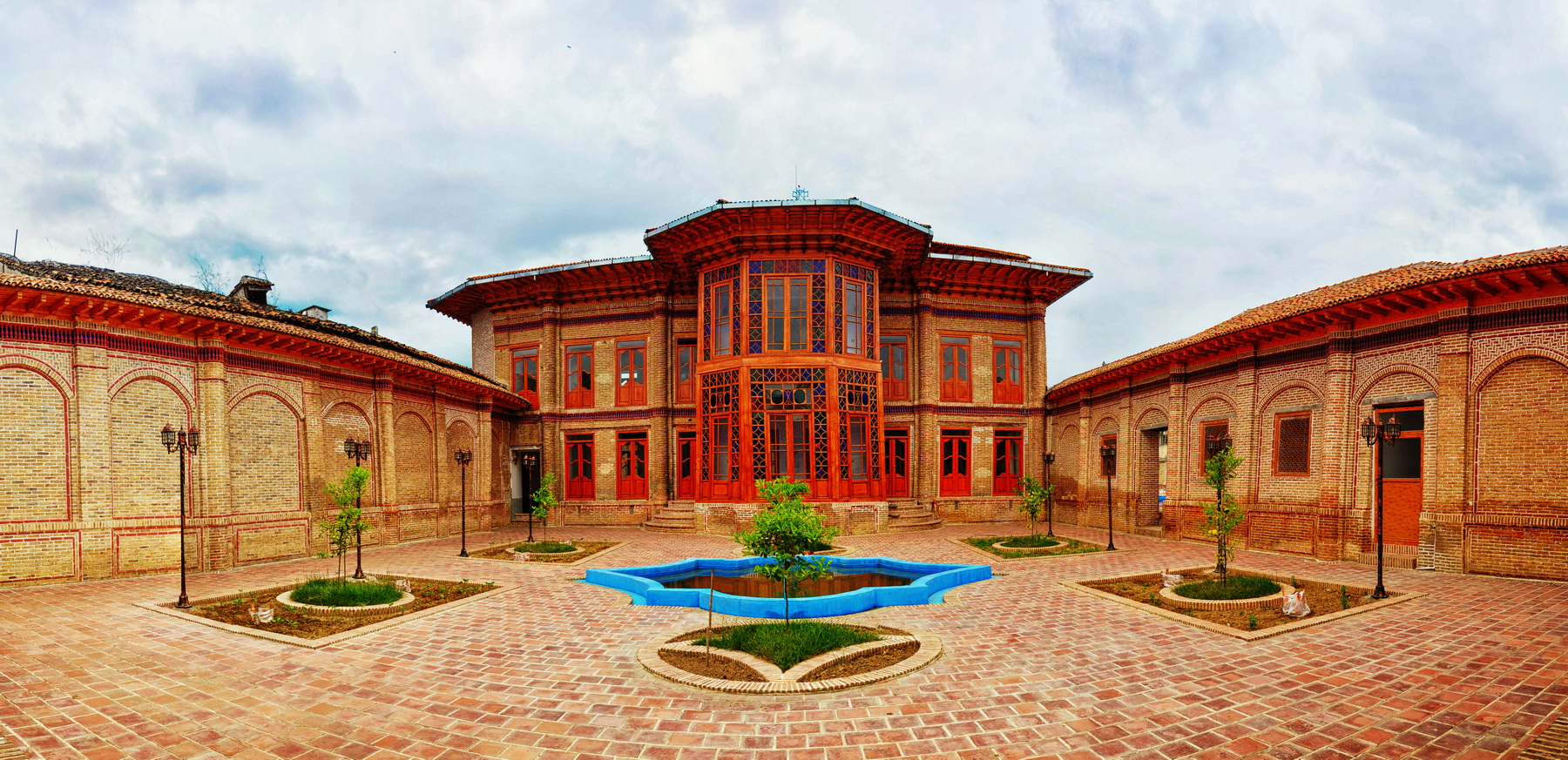 خانه فاضلی